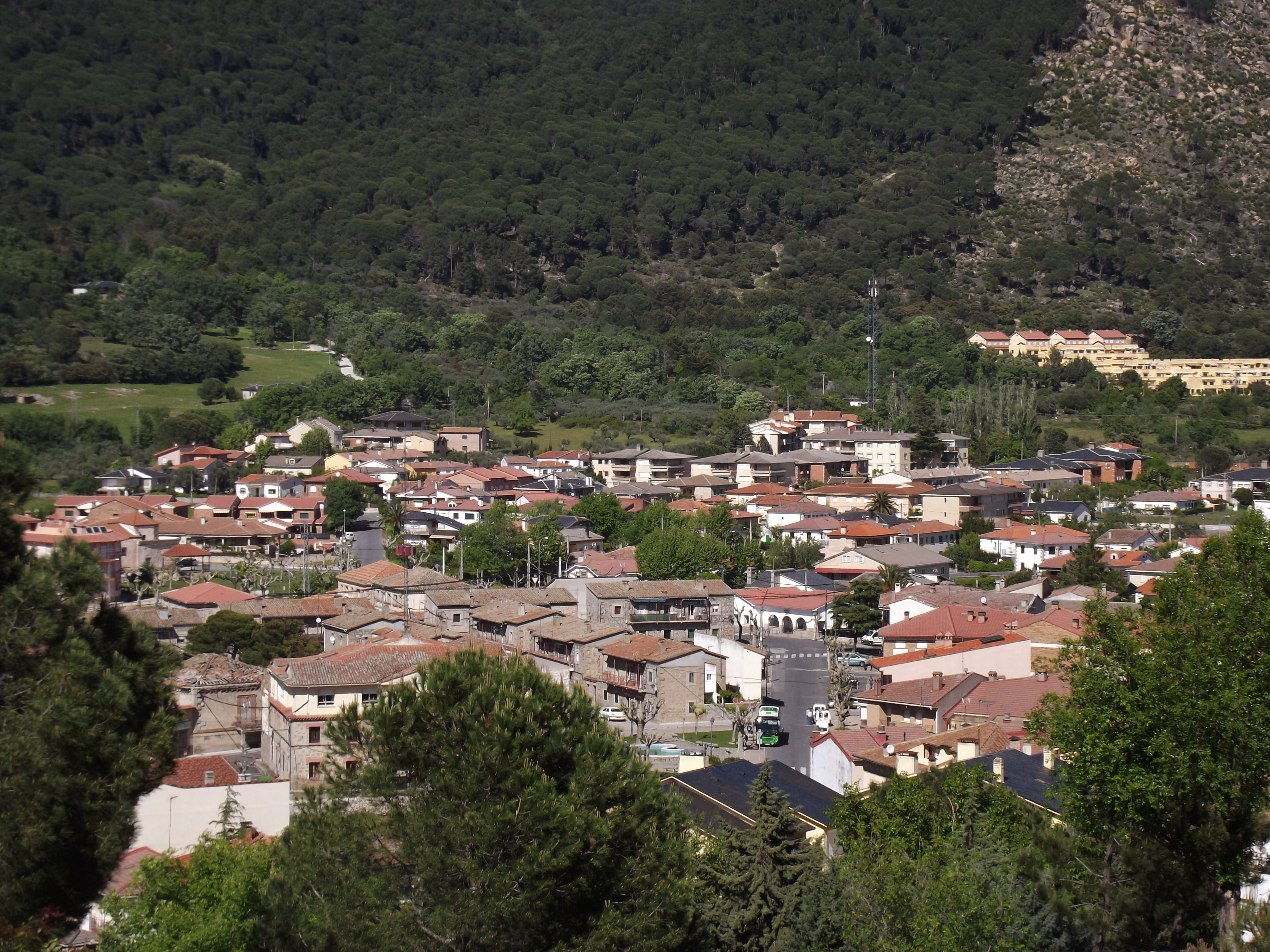 Vista parcial de La Adrada desde la colina del castillo.